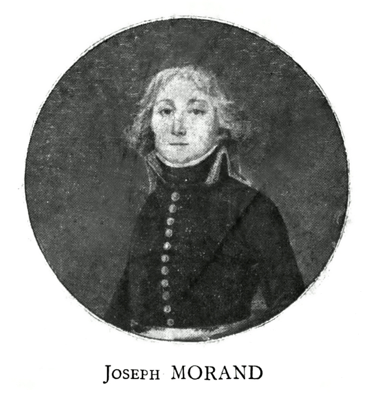 Porträt-Miniatur des Divisionsgenerals Joseph Morand (1757-1813)